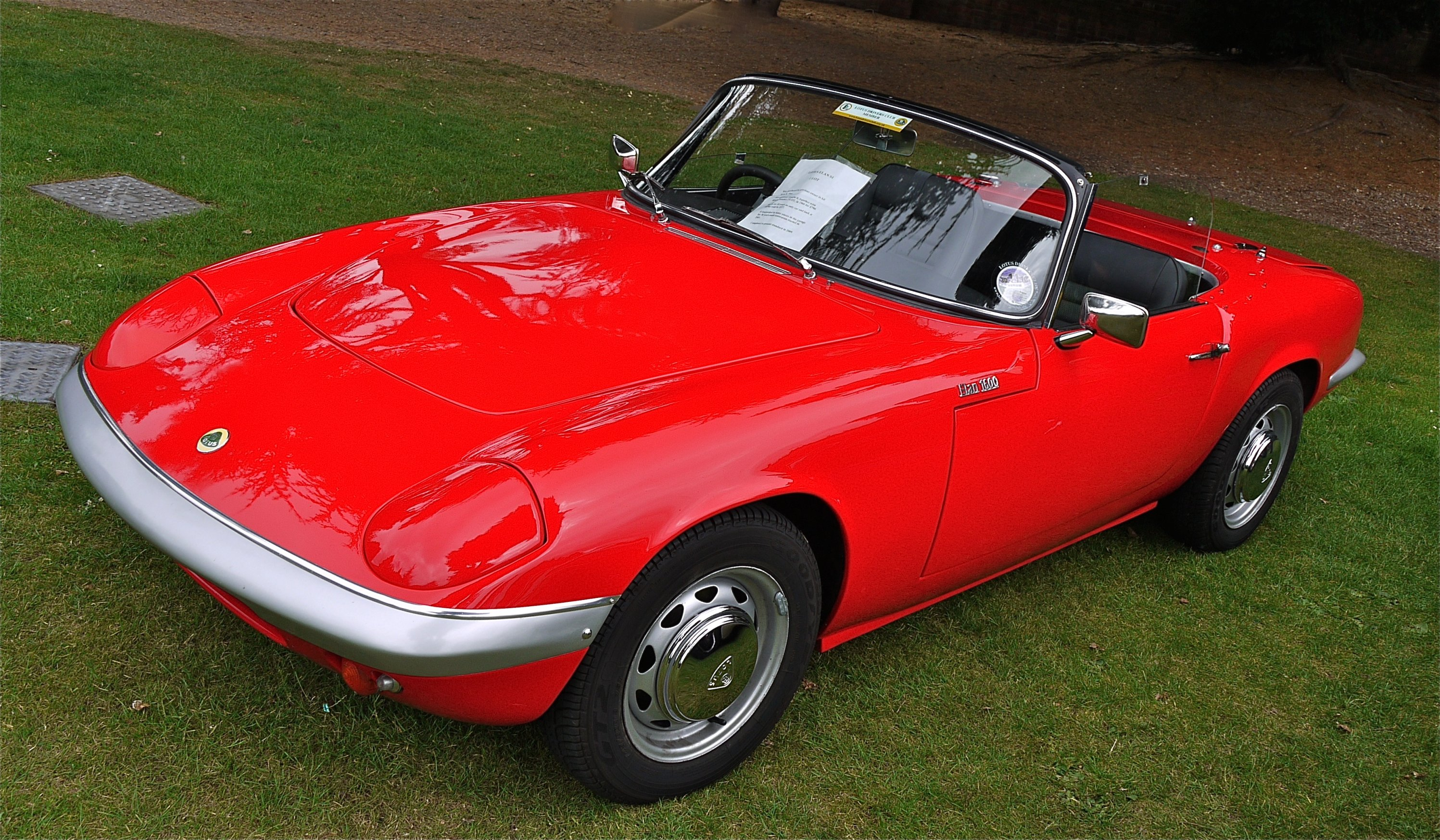 1964 Lotus Elan. Panasonic G1 14-45 Lens